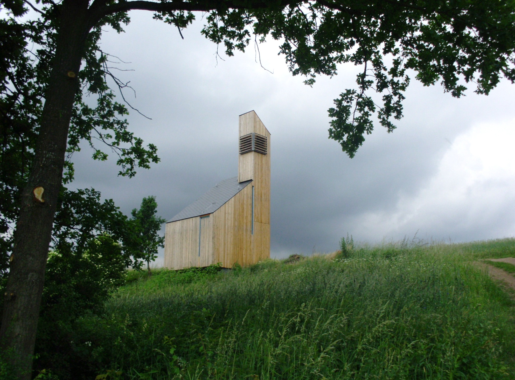 Muhr an See im mittelfränkischen Landkreis Weißenburg-Gunzenhausen, ökumenische Kapelle bei Wehlenberg am Büchelberg